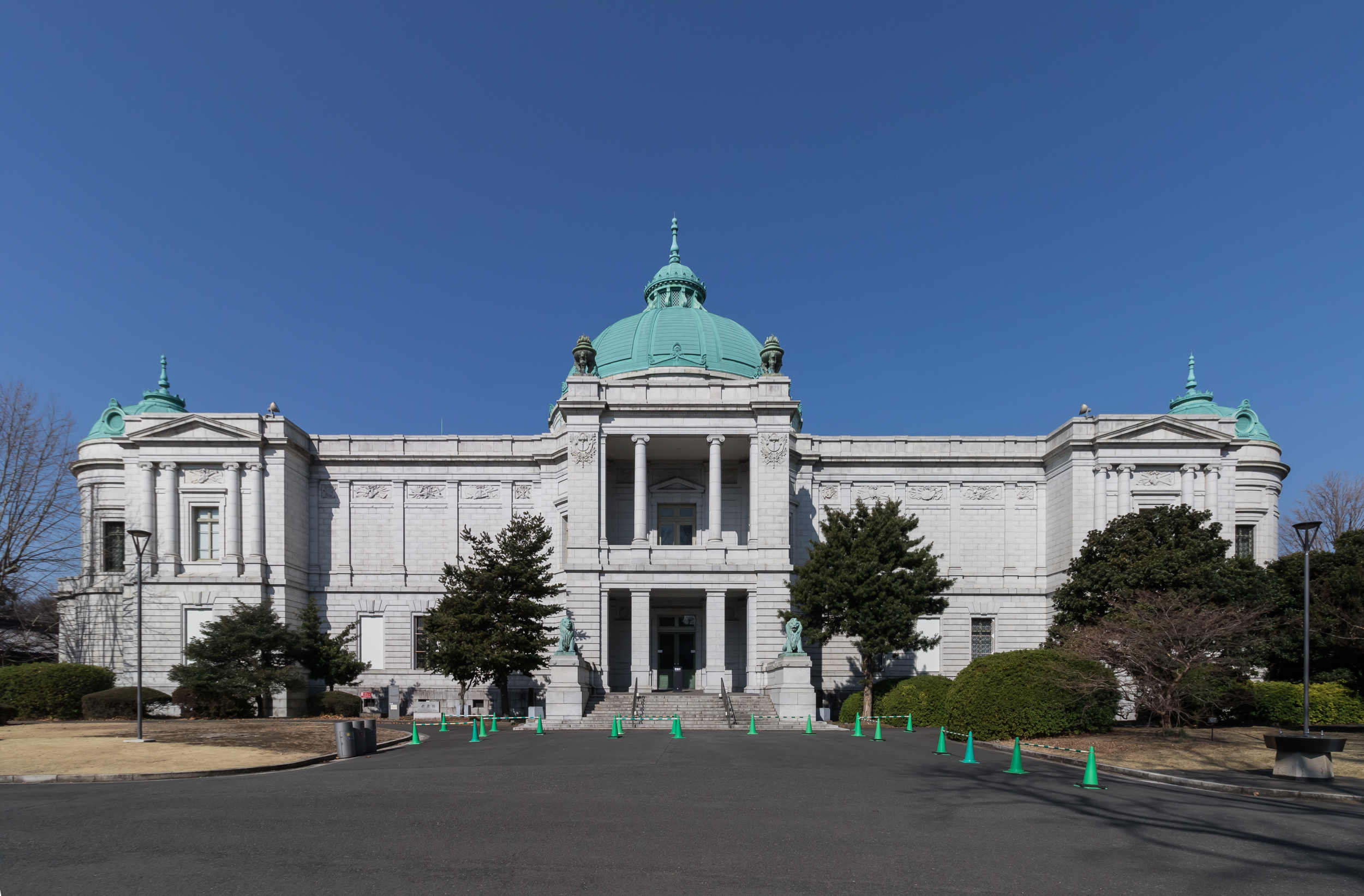 東京国立博物館 表慶館、東京都台東区、片山東熊設計、1909年。